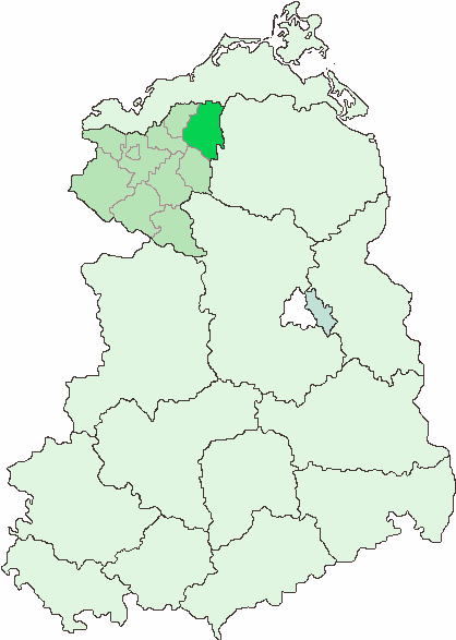 Skizze freihand erstellt Rauenstein 19:01, 10. Sep 2006 (CEST) HINWEIS: vorerst nicht für commons bestimmt.